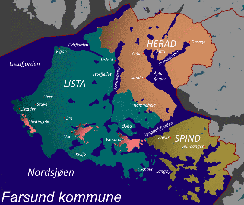 Kart over Farsund kommune; Lista, gårdsnummer 1-125; Herad, gårdsnummer 126-182; og Spind, gårdsnummer 183-240.